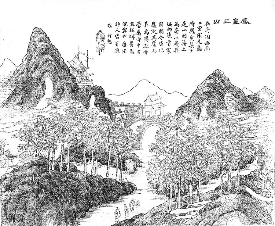 长干里客金陵四十八景图，封面标注了“长干里客金陵四十八景图……岁阴在赤奋若天中节蒲华馆主”，即1888年端午节。清光绪戊子申昌书局石印，款署端木瘦生及苕上徐虎，长干里客、端木瘦生均指清人徐虎。